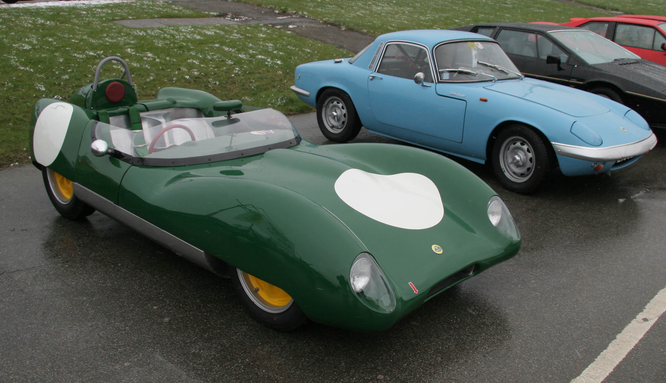 Lotus 17